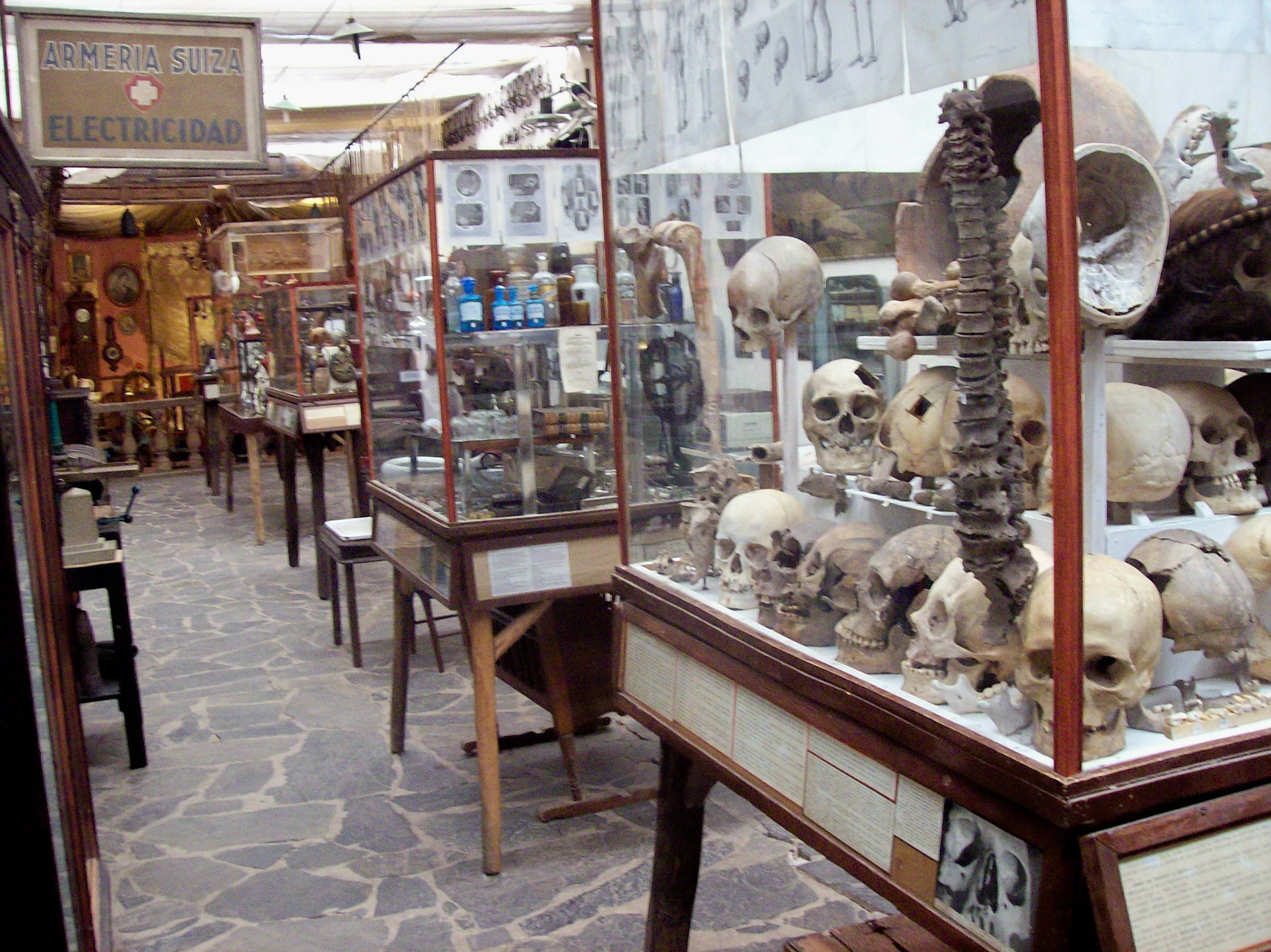 Rocsen, Museo Polifacético, en Nono, provincia de Córdoba, Argentina